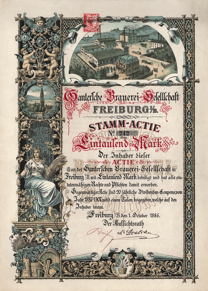 Historische Aktie der Gantersche Brauerei in Freiburg i.B., ausgegeben 1886